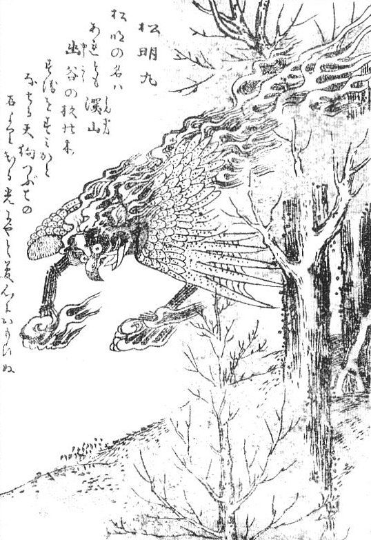 Taimatsu-maru (松明丸) from the Gazu Hyakki Tsurezure Bukuro (百器徒然袋)